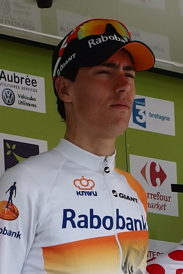 Tour de Bretagne 2014 - Présentation des équipes au départ de la sixième étape à Radenac - Équipe Rabobank Development Depicted person: Timo Roosen